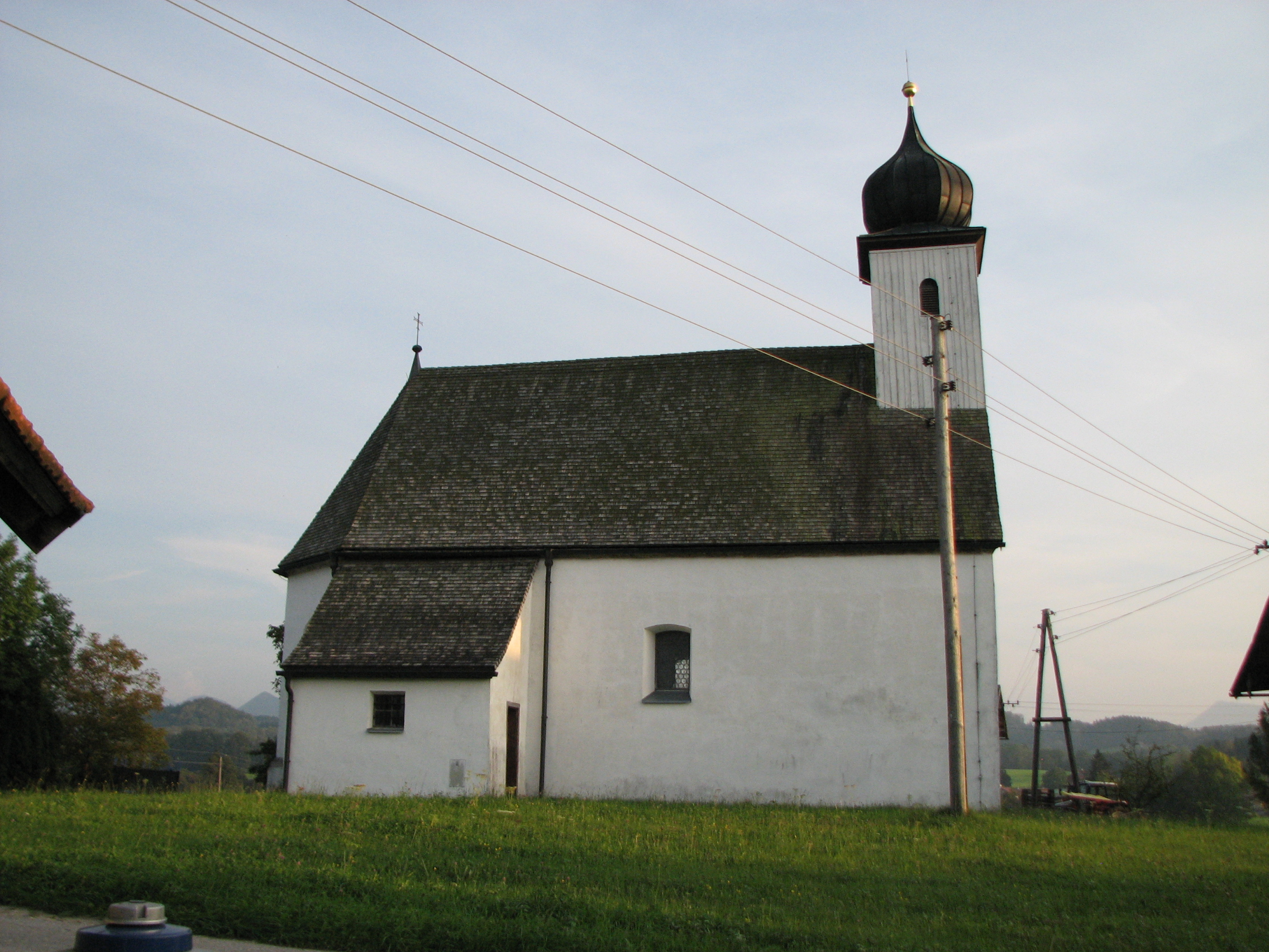 Kath. Filialkirche hl. Jakobus d. Ä. in Unzing